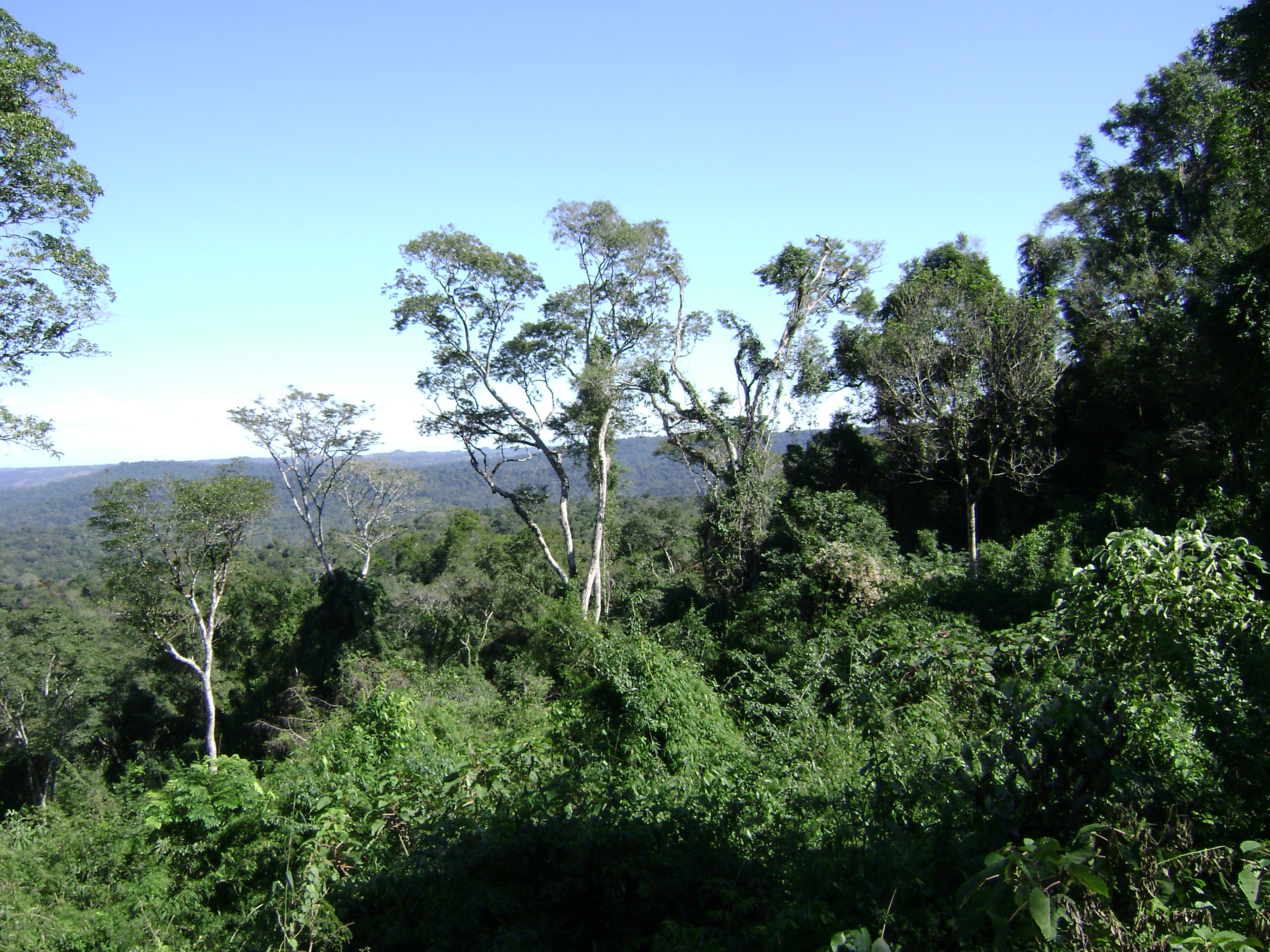 zona de sierras